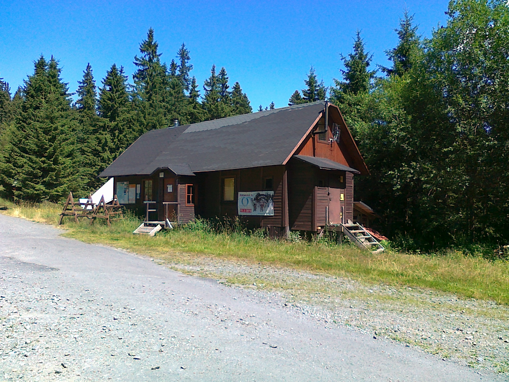 Bufet u Herdegenů przy skrzyżowaniu turystycznym Alfrédka